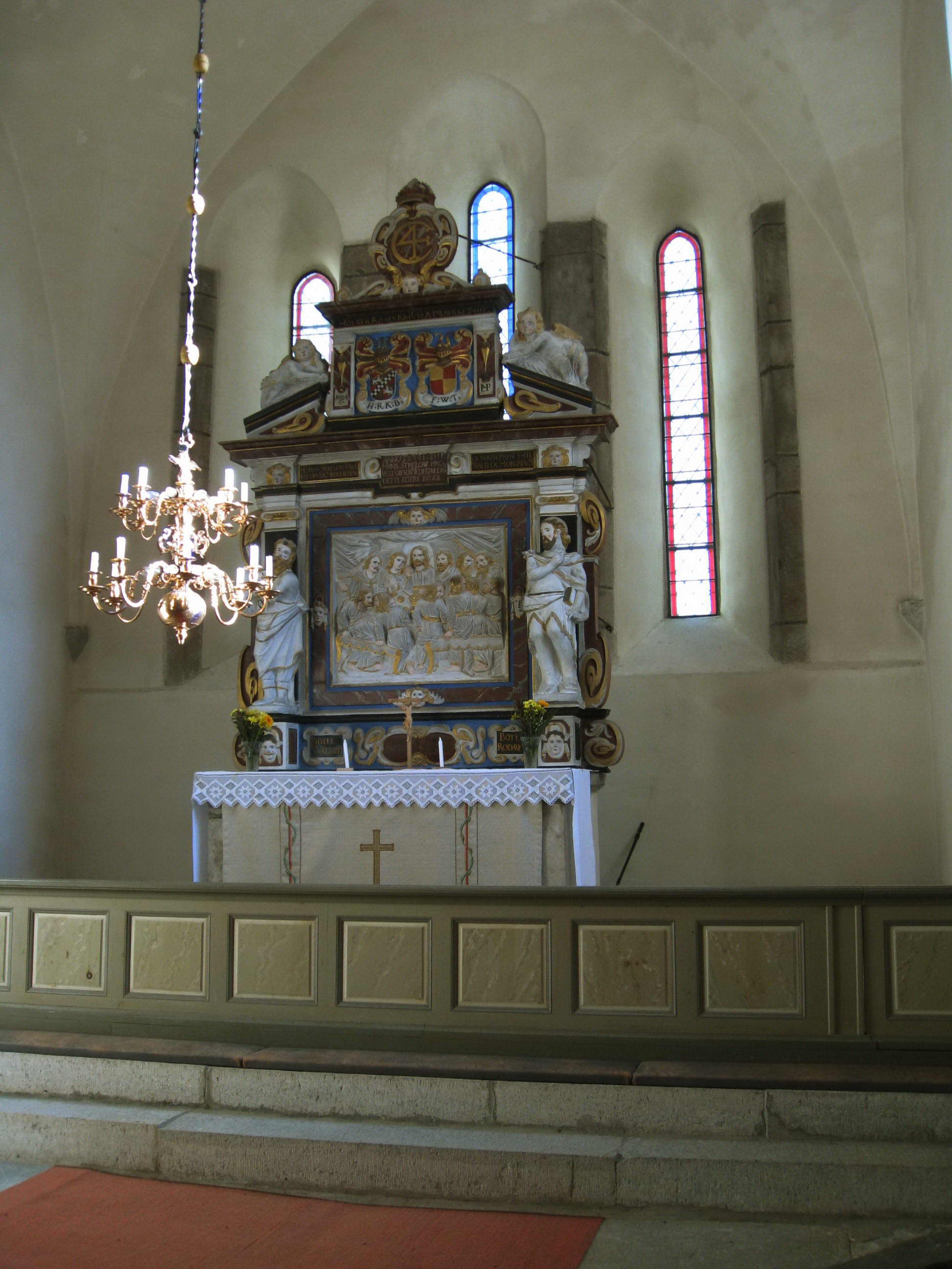 Altarordningen.